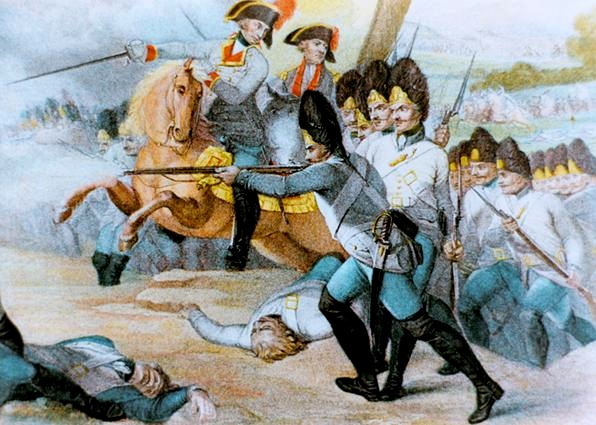 Grenadiers autrichiens d'un régiment allemand, pré-1798.